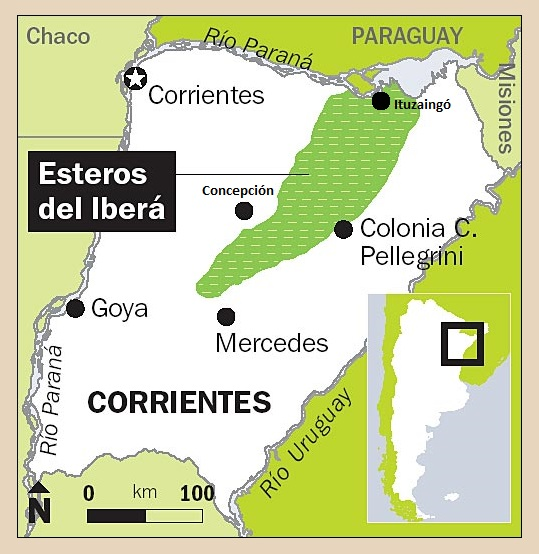 Esteros del Iberá, el segundo mayor humedal del mundo, provincia de Corrientes, Argentina